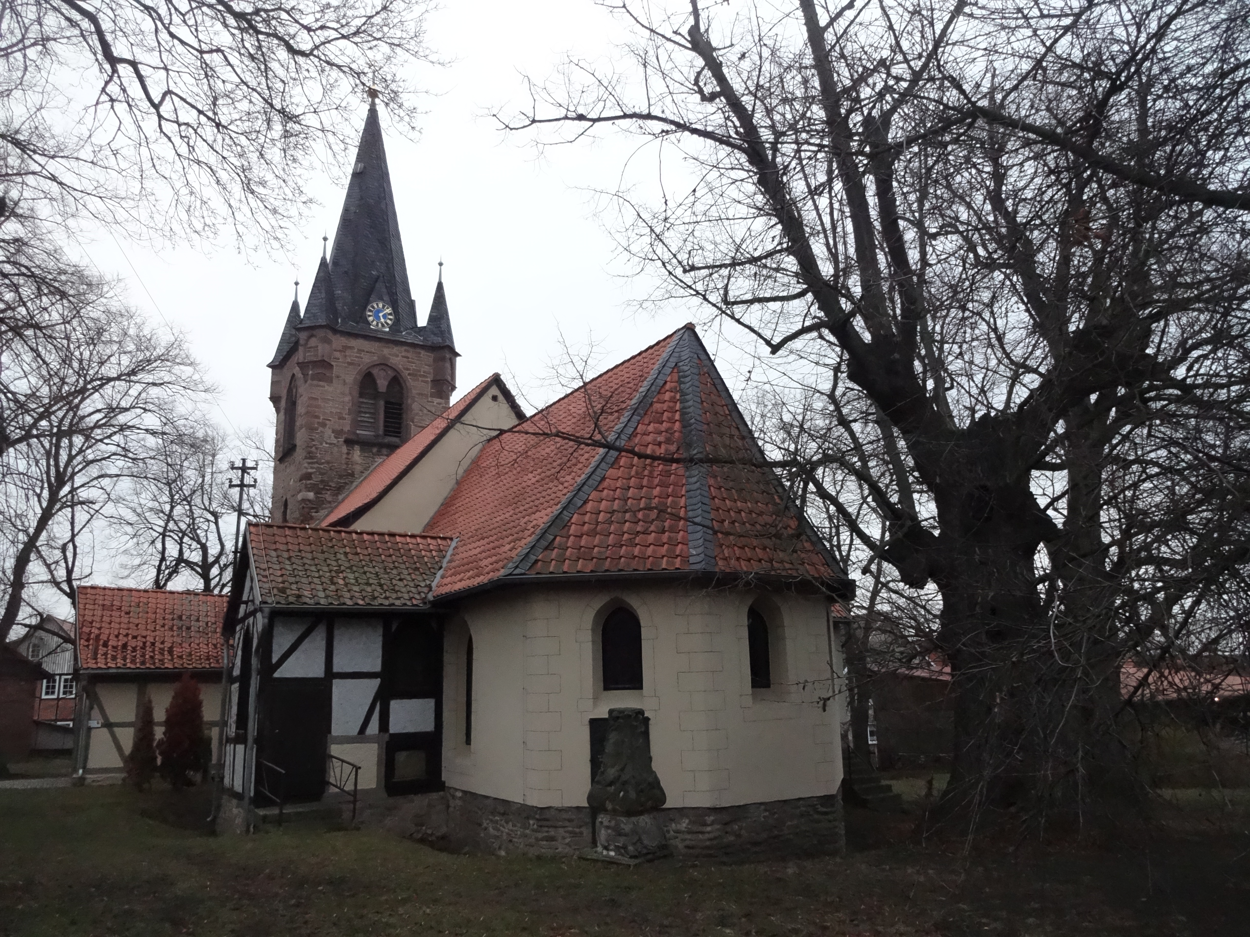 denkmalgeschützte Kirche in Silstedt